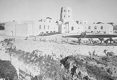 מוזיאון רוקפלר מתוך אוסף תצלומים שצולם בין השנים 1898-1946 בירושלים